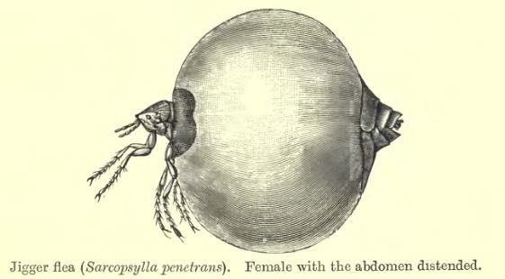 Chigger flea